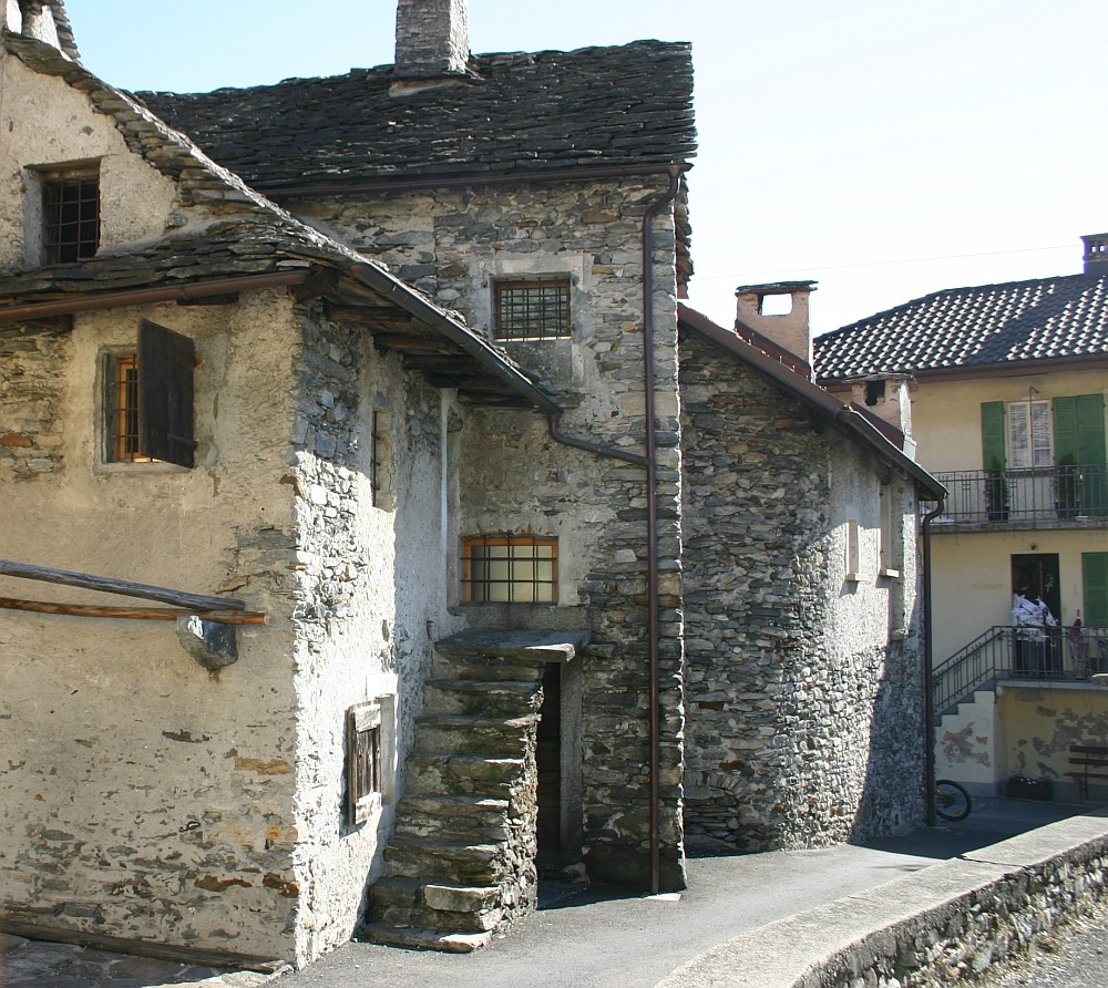 Typische Häuser von Cugnasco